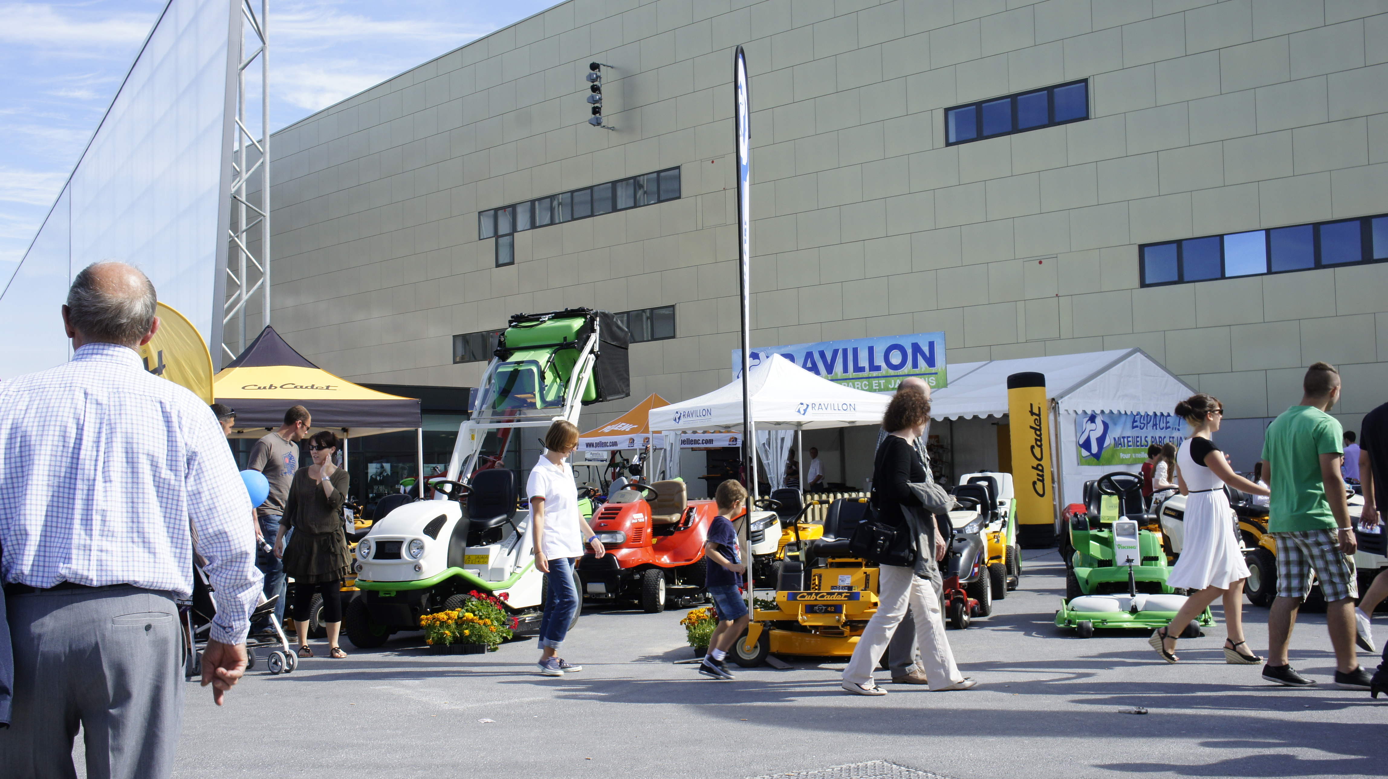 Exposition devant la halle lors de la Foire de Châlons-en-Champagne de 2012 .